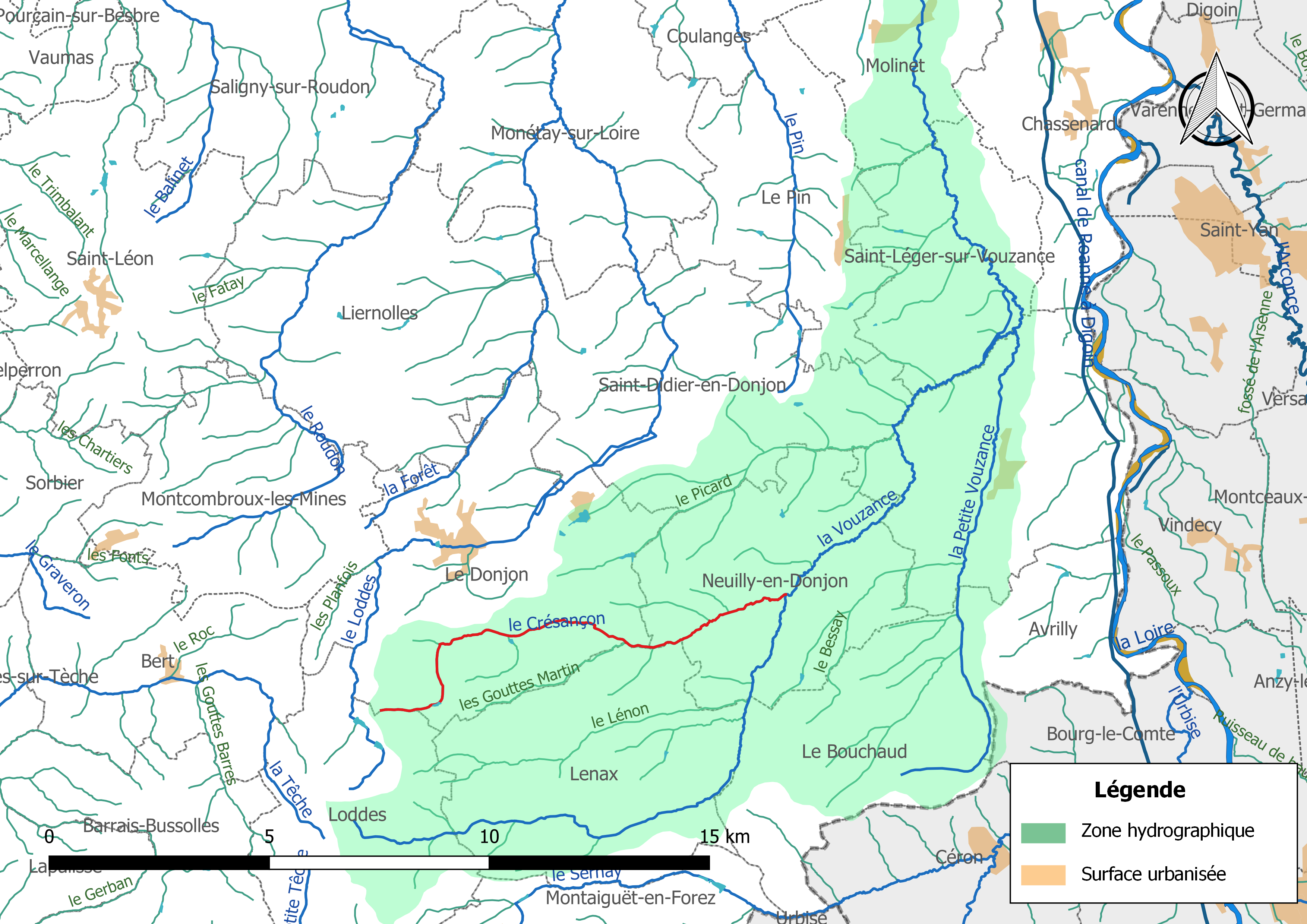 Carte du cours d'eau « le Crésançon » (France) et de la zone hydrographique dans laquelle il s'insère.